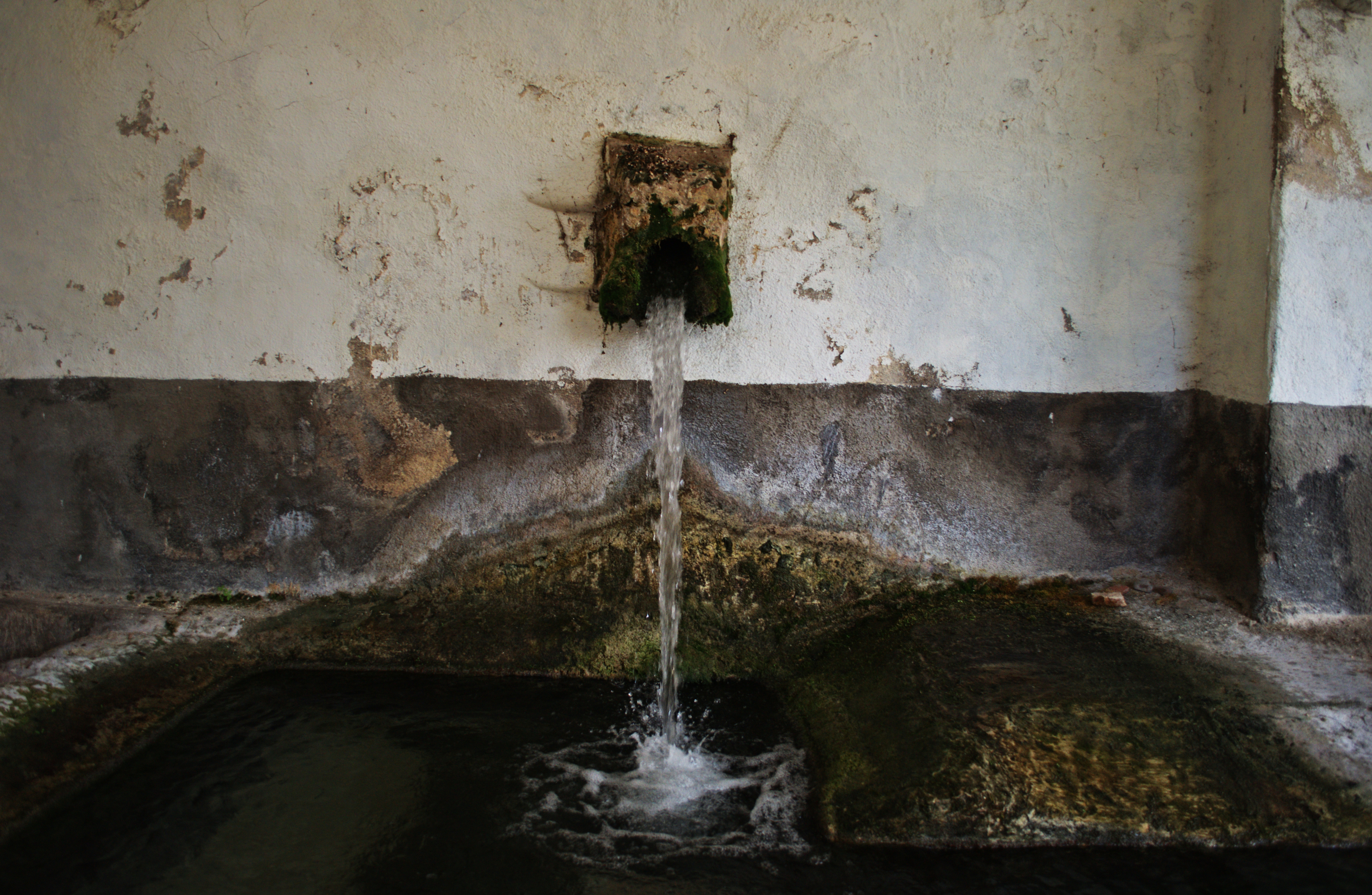 Lavadero de Argecilla (Guadalajara, España).